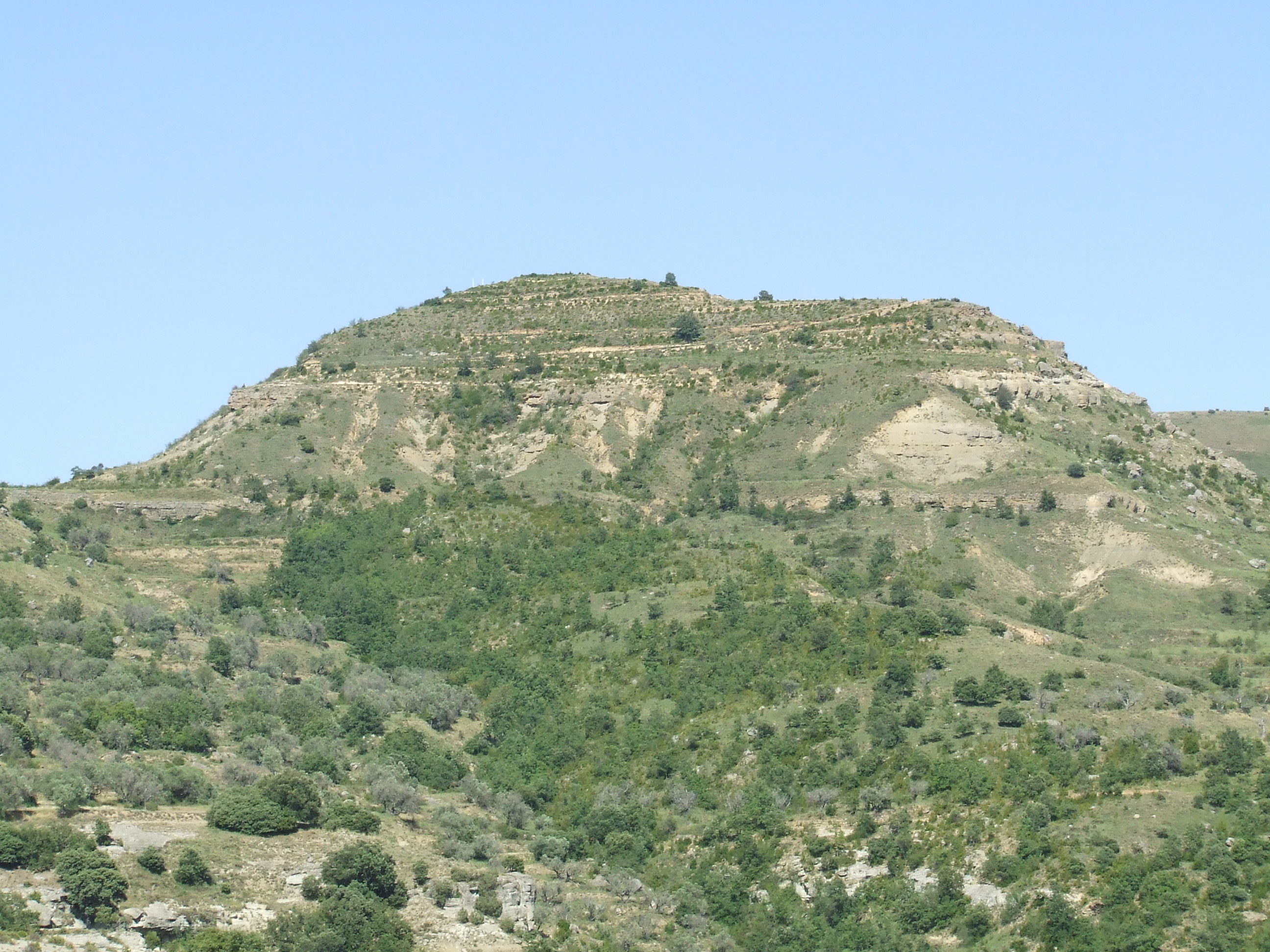 El Tossal Gros (Fígols de Tremp, Tremp, Pallars Jussà)